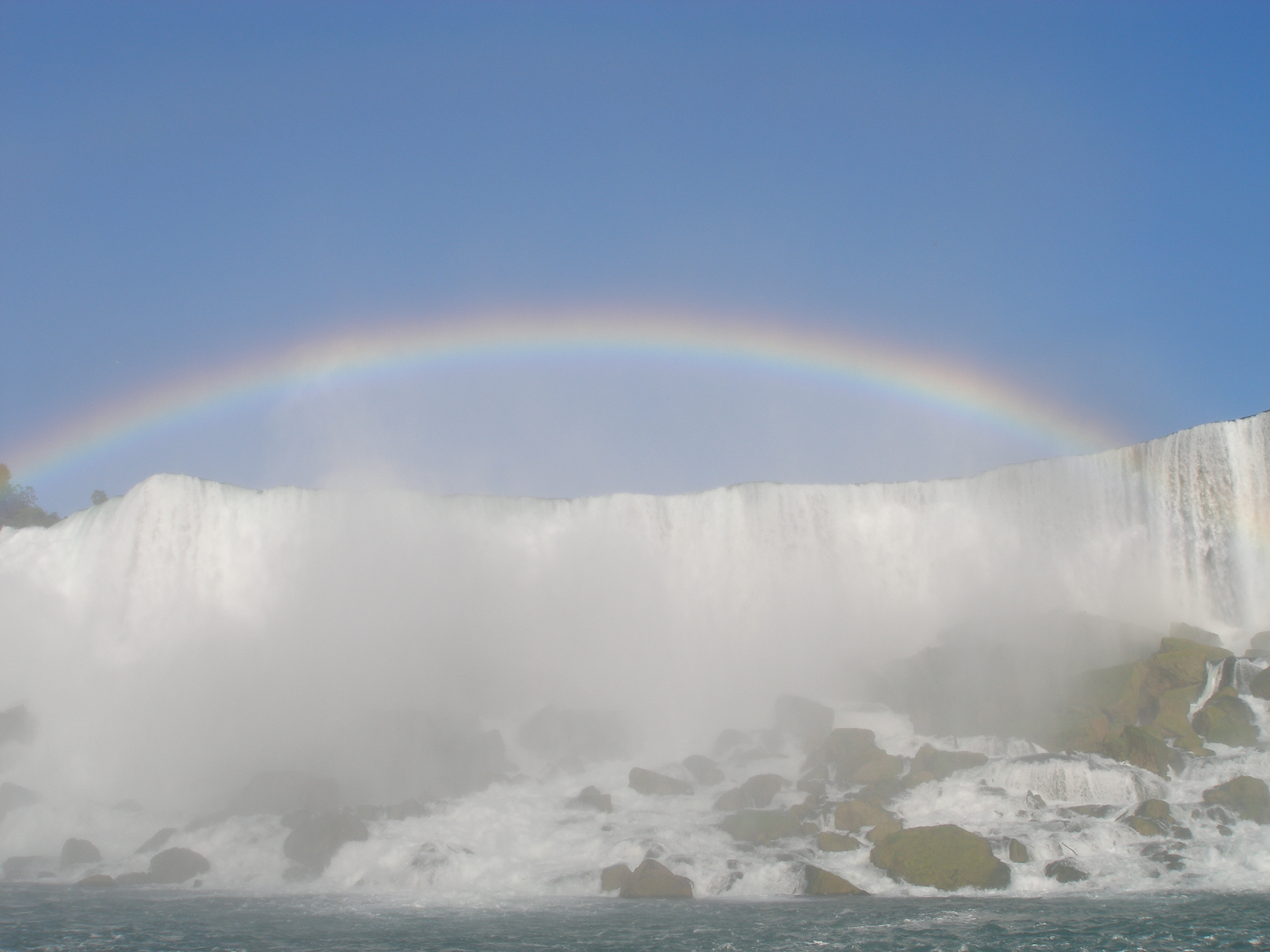 Część wodospadu Niagara po stronie amerykańskiej z uchwyconą tęcza.